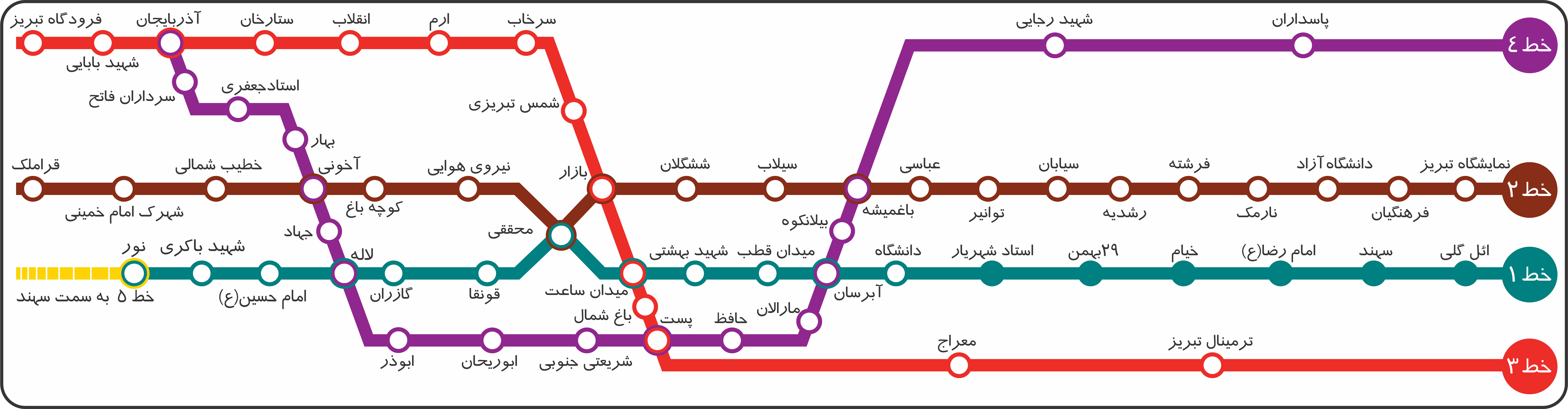 نقشه جدید متروی تبریز به همراه شش ایستگاه افتتاح شده از خط یک